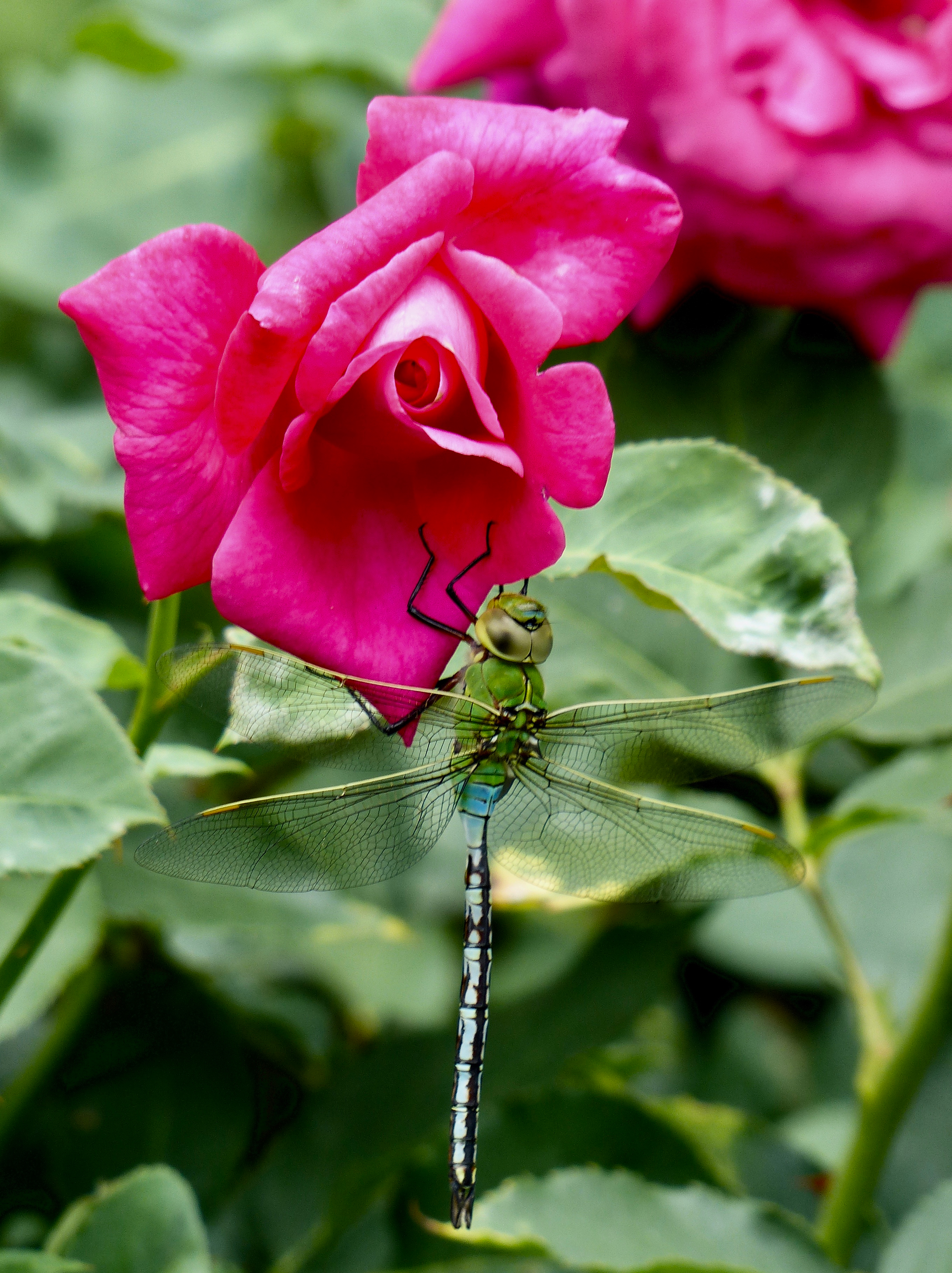 Rosa ' Peter Frankenfeld' mit einer Libelle im Rosengarten der Stadt Köln, Juni 2017